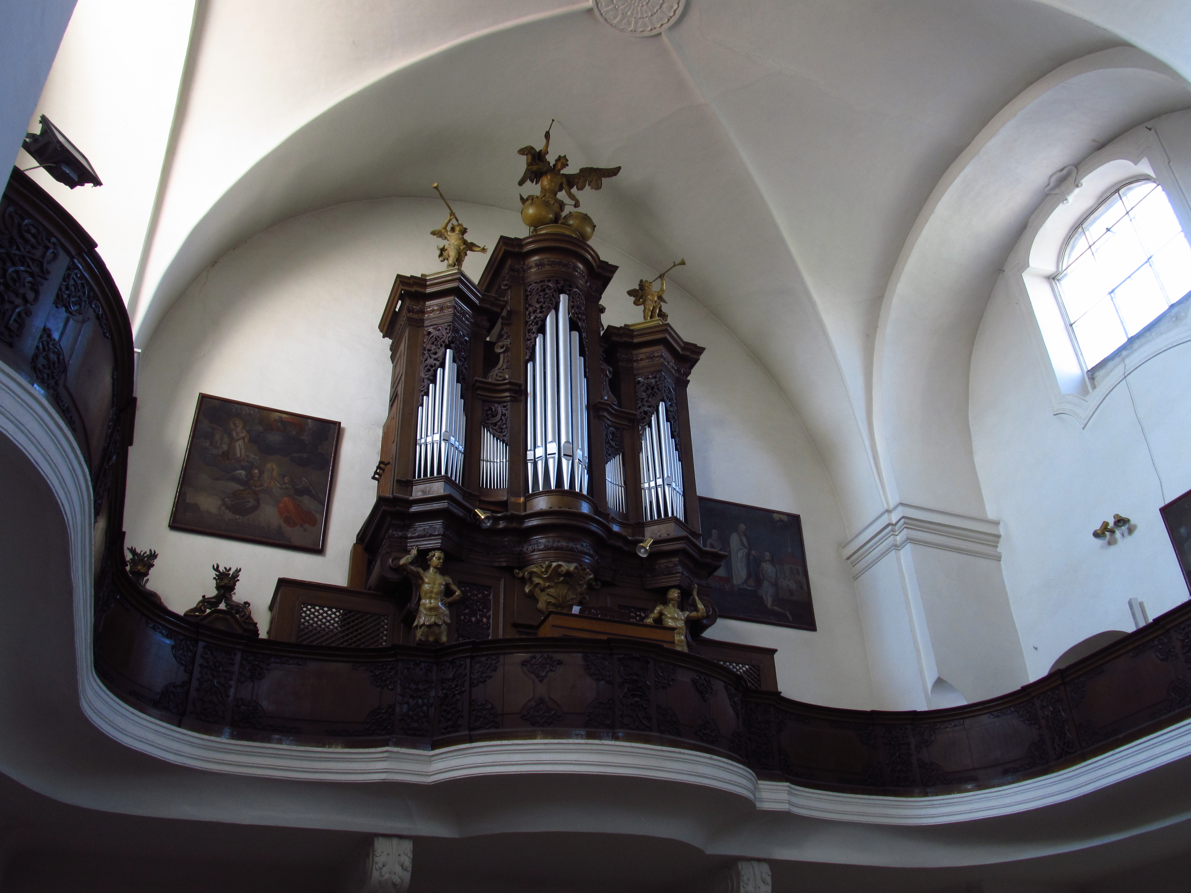 Interiér kostela sv. Benedikta na Hradčanech v Praze.